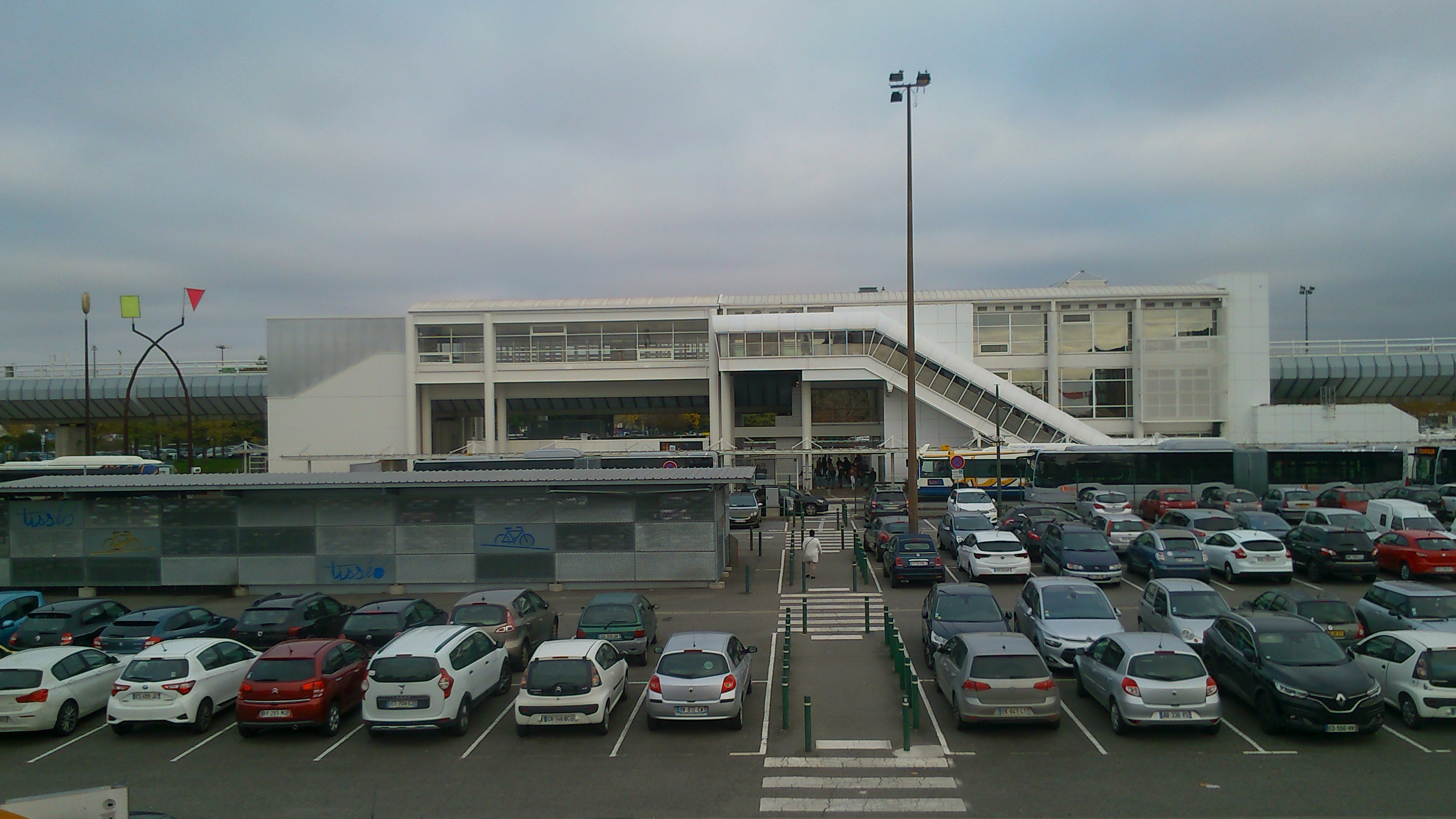 La station de métro Mirail - Basso Cambo en 2018, agrandie pour les rames de 52m.